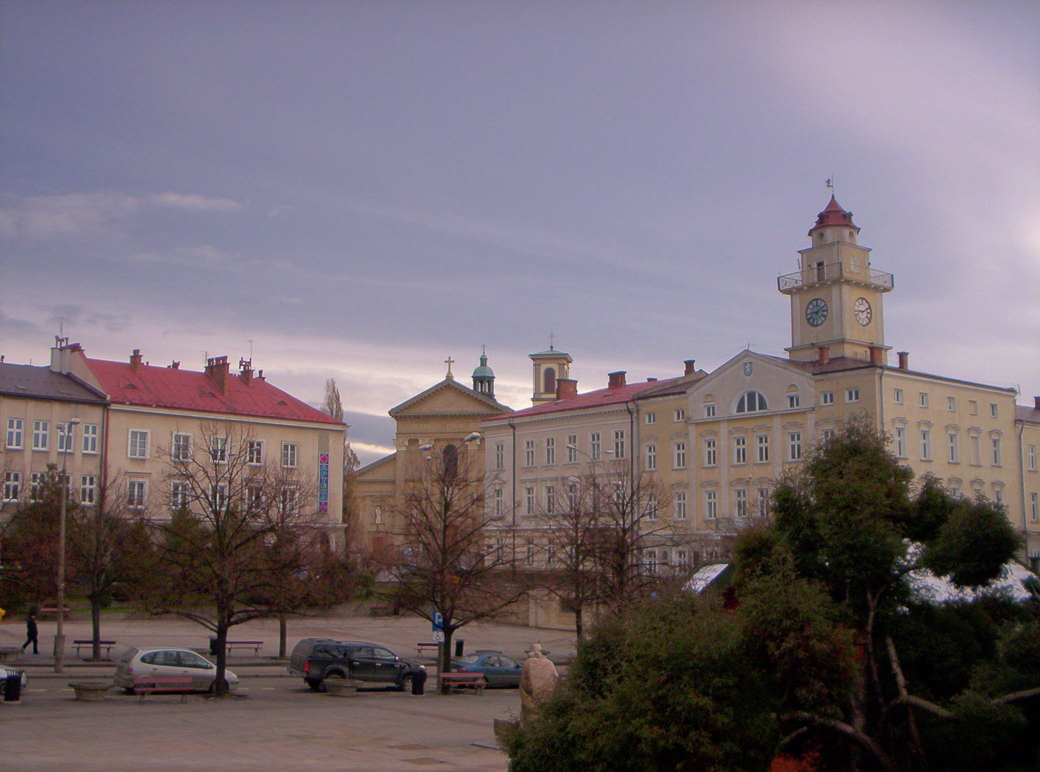 Rynek w Gorlicach